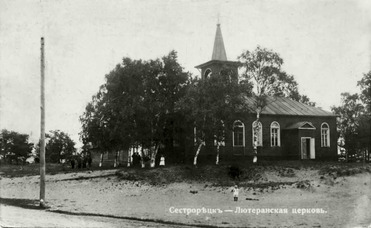 Кирха прихода Сиестарйоки. 1911 г.